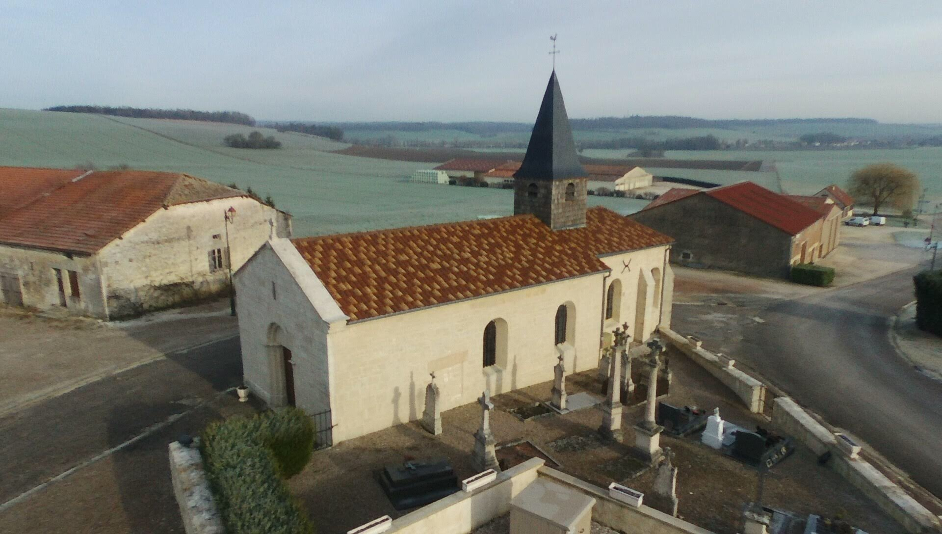 Photo relative à la commune d’Aingoulaincourt dans le but d’enrichir la page Wikipedia existante, il y a la photo d’Aingoulaincourt , et de son Église ( aussi intérieur)